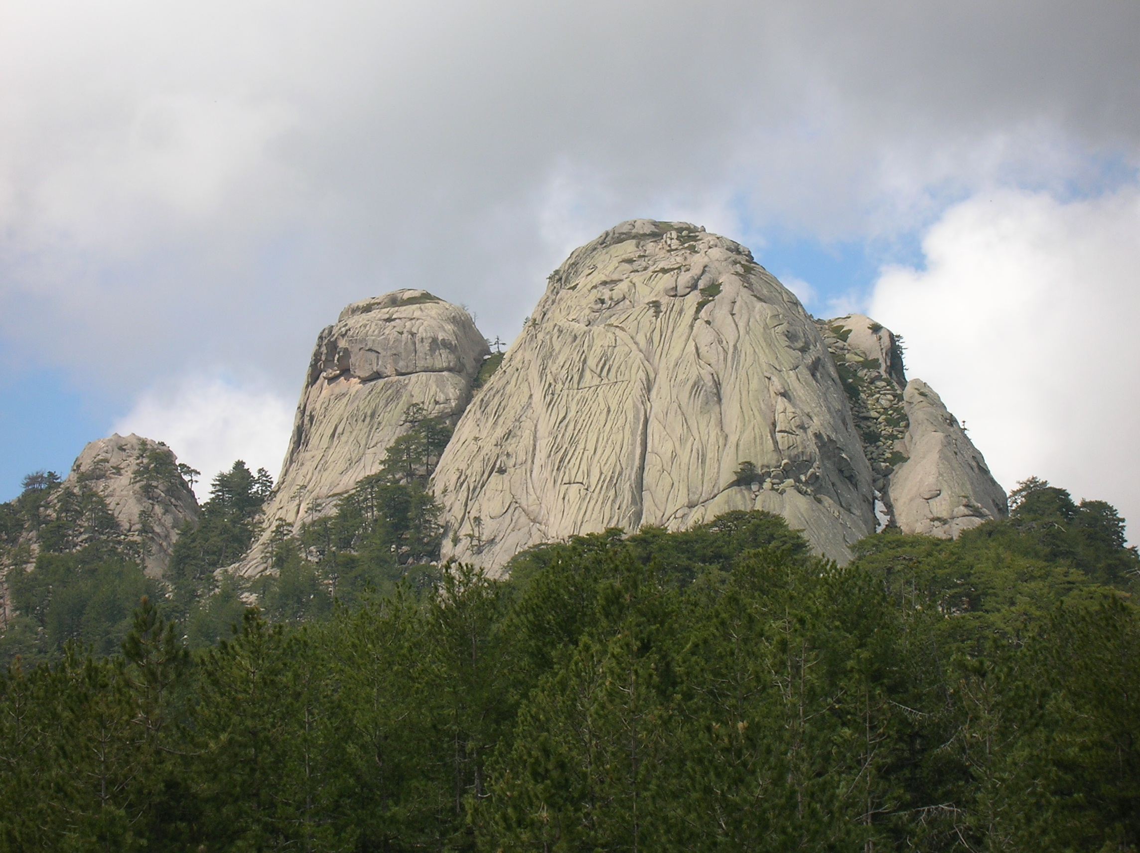 Sommet caractèristique visible depuis de nombreux villages de la vallée du Cruzzini.